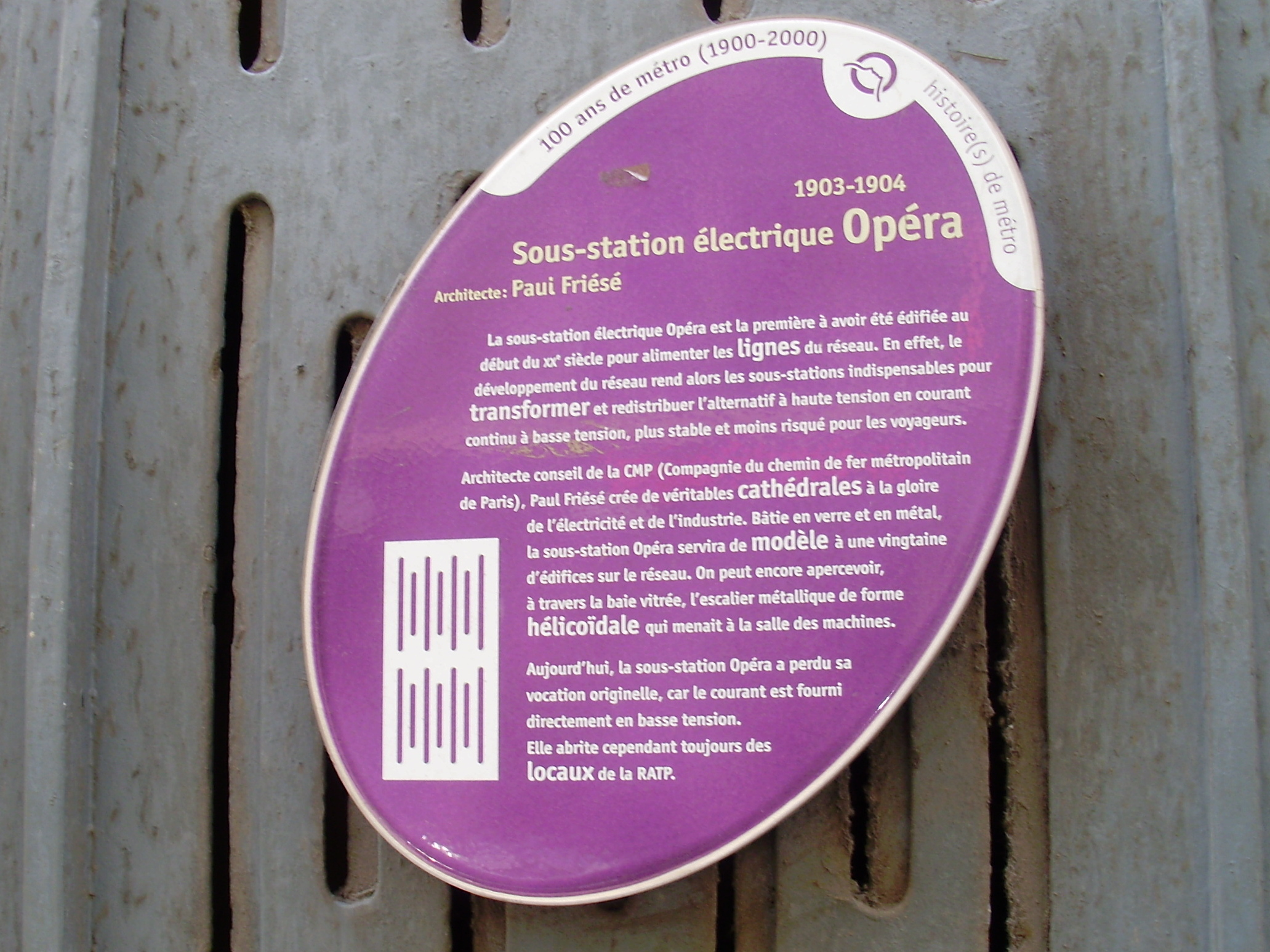 Panneau d'information de la sous-station électrique Opéra, située au 41 de la rue de Caumartin, Paris 9e, France.